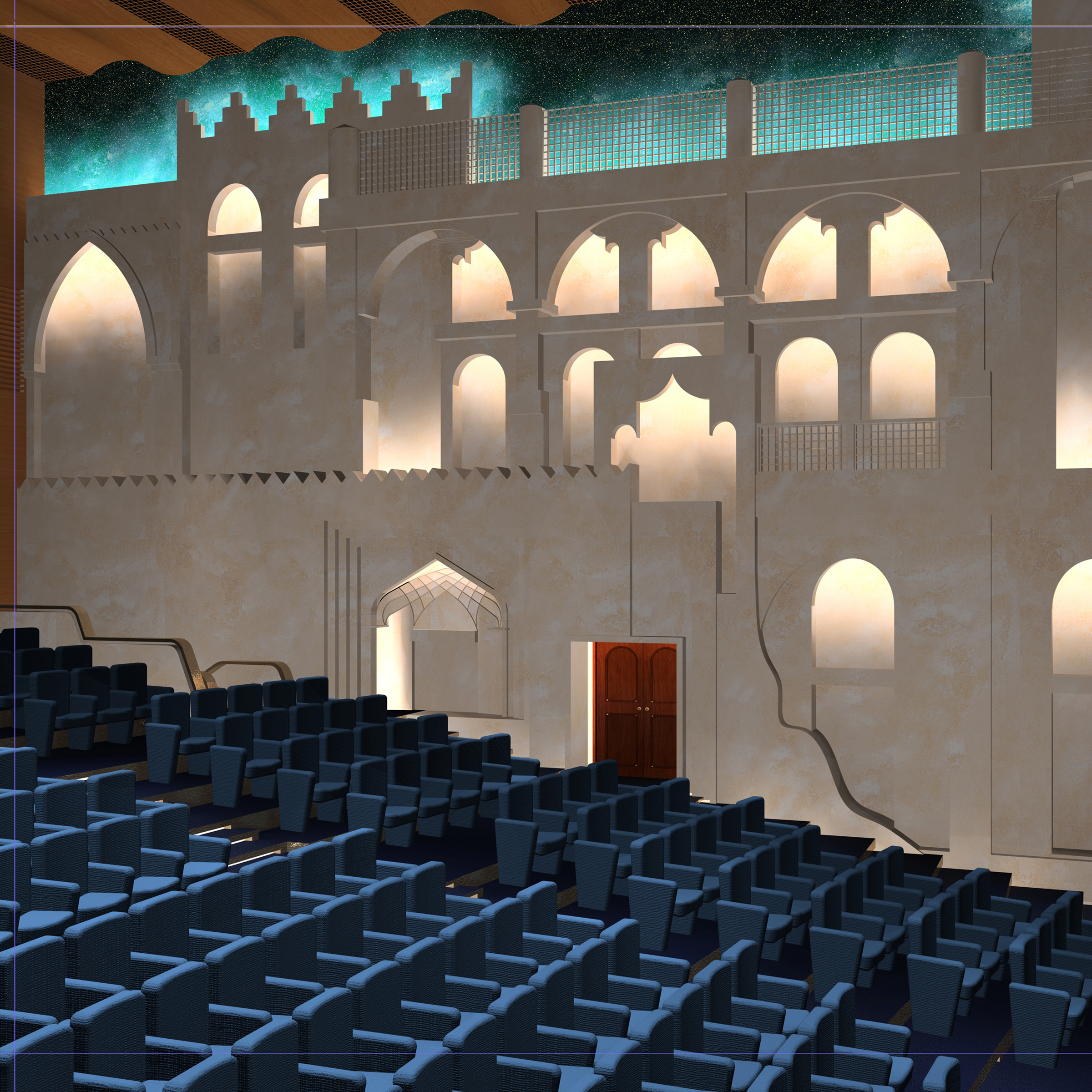 Progetto di sistemazione interna del Centro Culturale Governativo di Doha. Teatro interno (Doha, Qatar) Architetto: Oreste Ruggiero